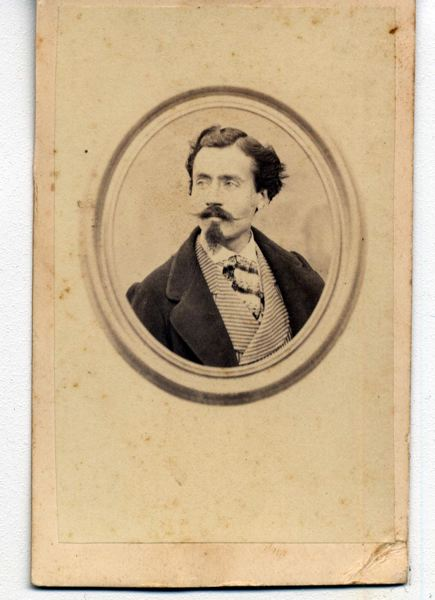 Leopoldo Marenco - Ritratto fotografico eseguito dalla Fotografia Medici di Bologna circa nel 1870. Tecnica fotografica albumina; dimensioni 89x56 mm.